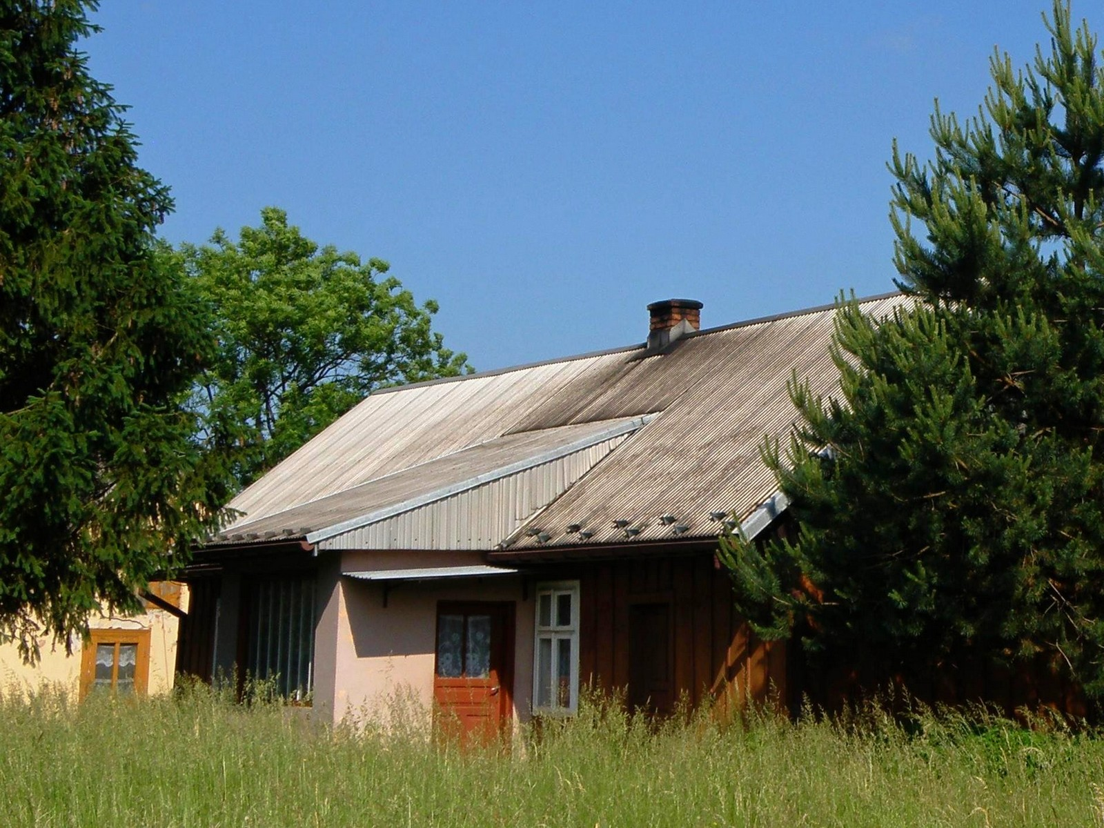 Dom rodzinny - Emilia Hynek - Borzecin